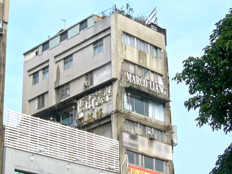 臺北市中正區忠孝西路一段與延平南路口，台北商業大樓外牆設置的瑪爾蔻梁英語教室（一二三英語補習班）霓虹招牌，於2016年瑪爾蔻梁病逝後拆除右側英文招牌、保留左側中文招牌。